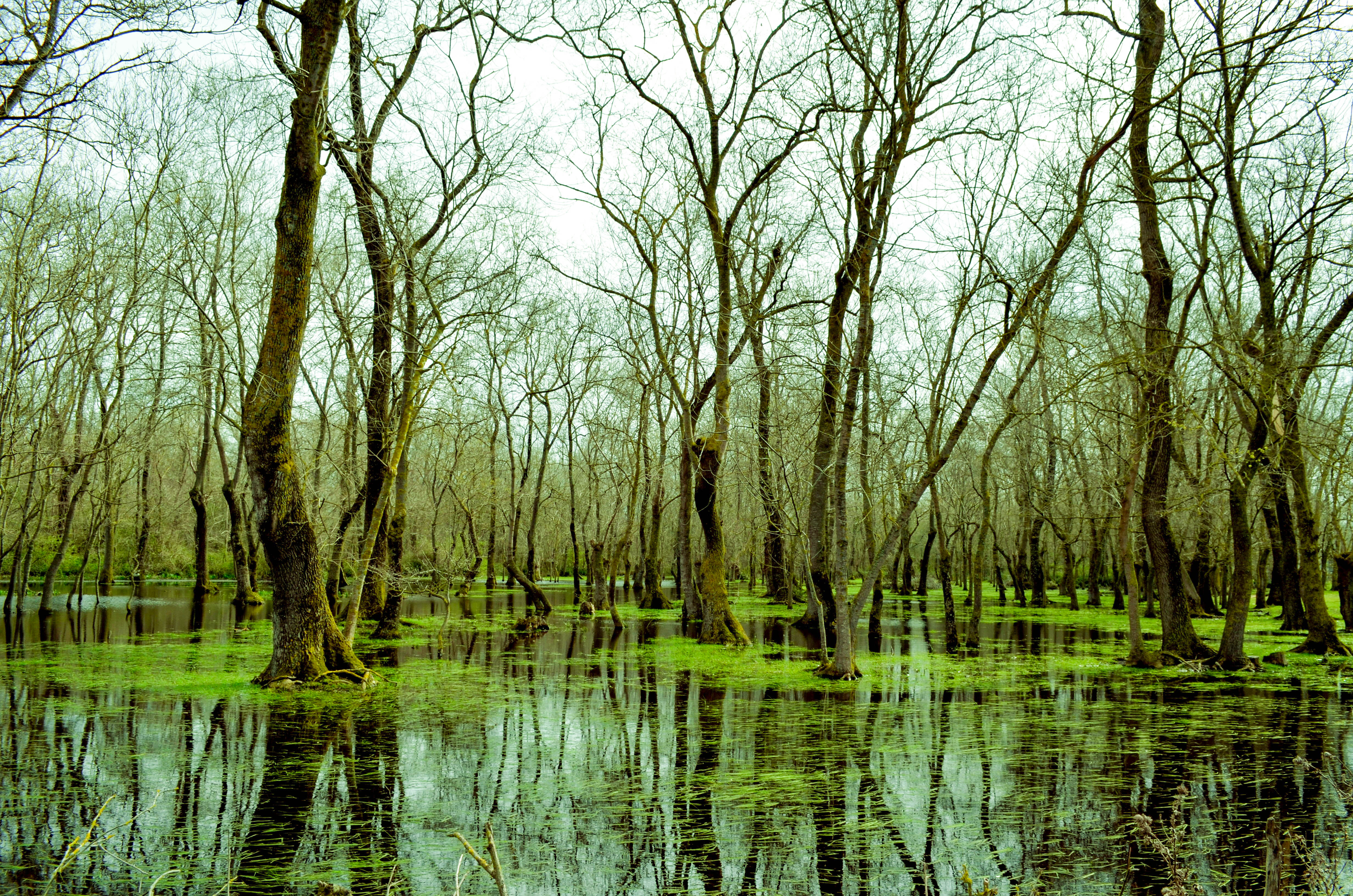 Galeriç Subasar Ormanı